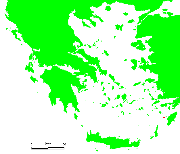 GR Chalki.PNG (Greek island)